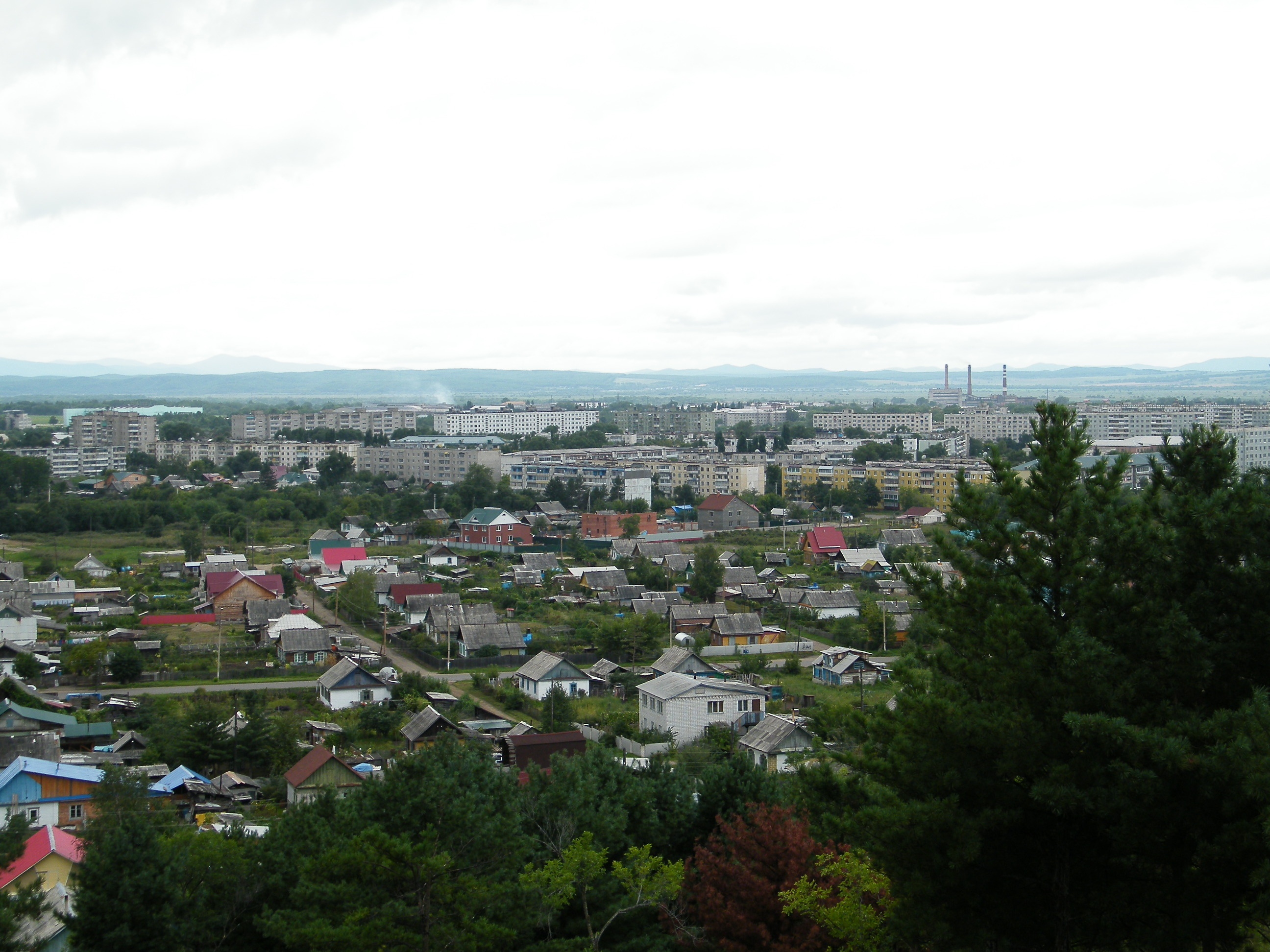 Россия, Приморский край, город Арсеньев.